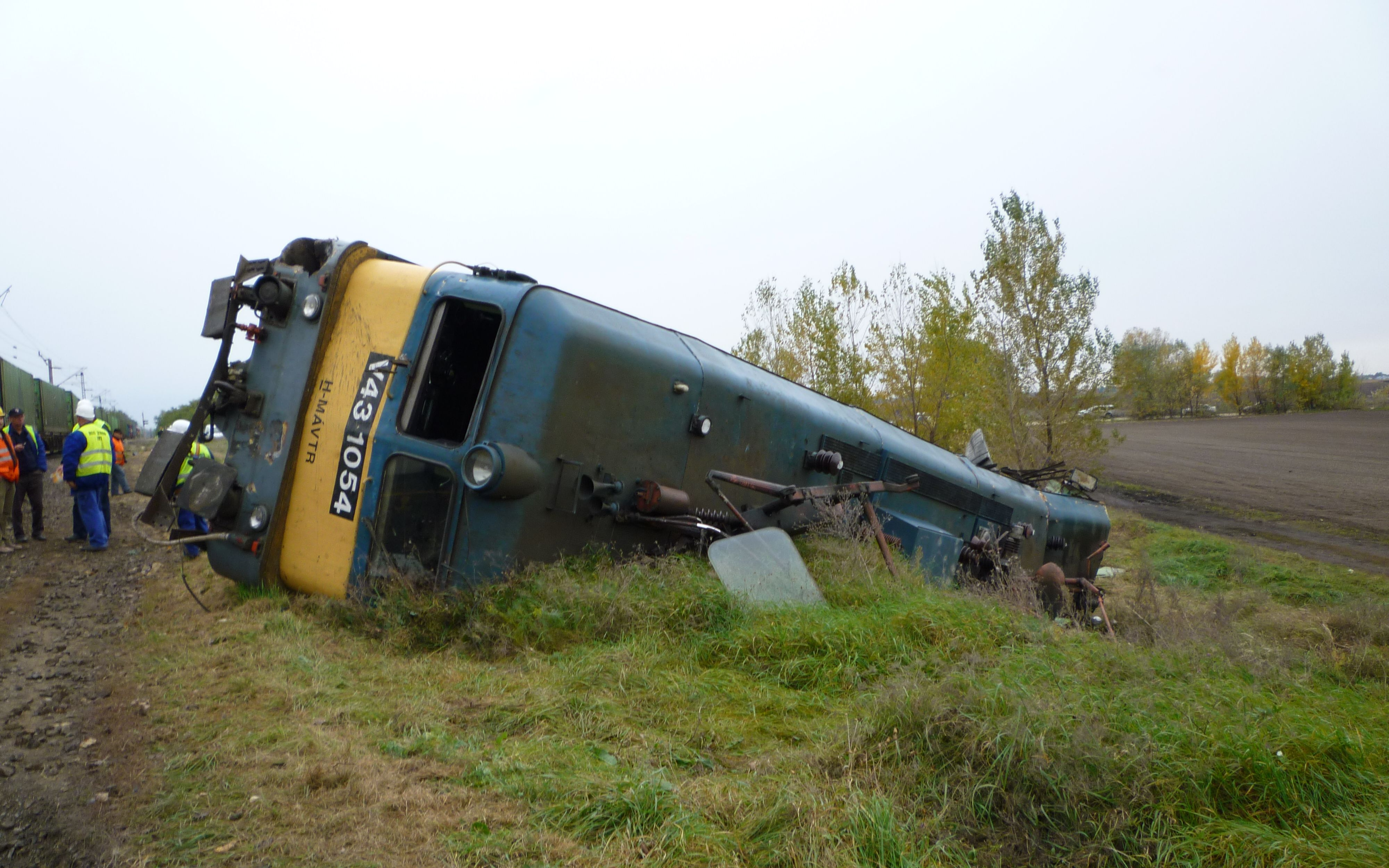 A Budapest–Kelebia-vasútvonalon, Délegyháza–Kiskunlacháza állomások között az AS 322 jelű útátjáróban tehervonat ütközött kavicsszállító tehergépjárművel 2010. október 20-án. A tehervonat V43 1054 pályaszámú mozdonya kisiklott és a vasúti töltés rézsűjére borult.